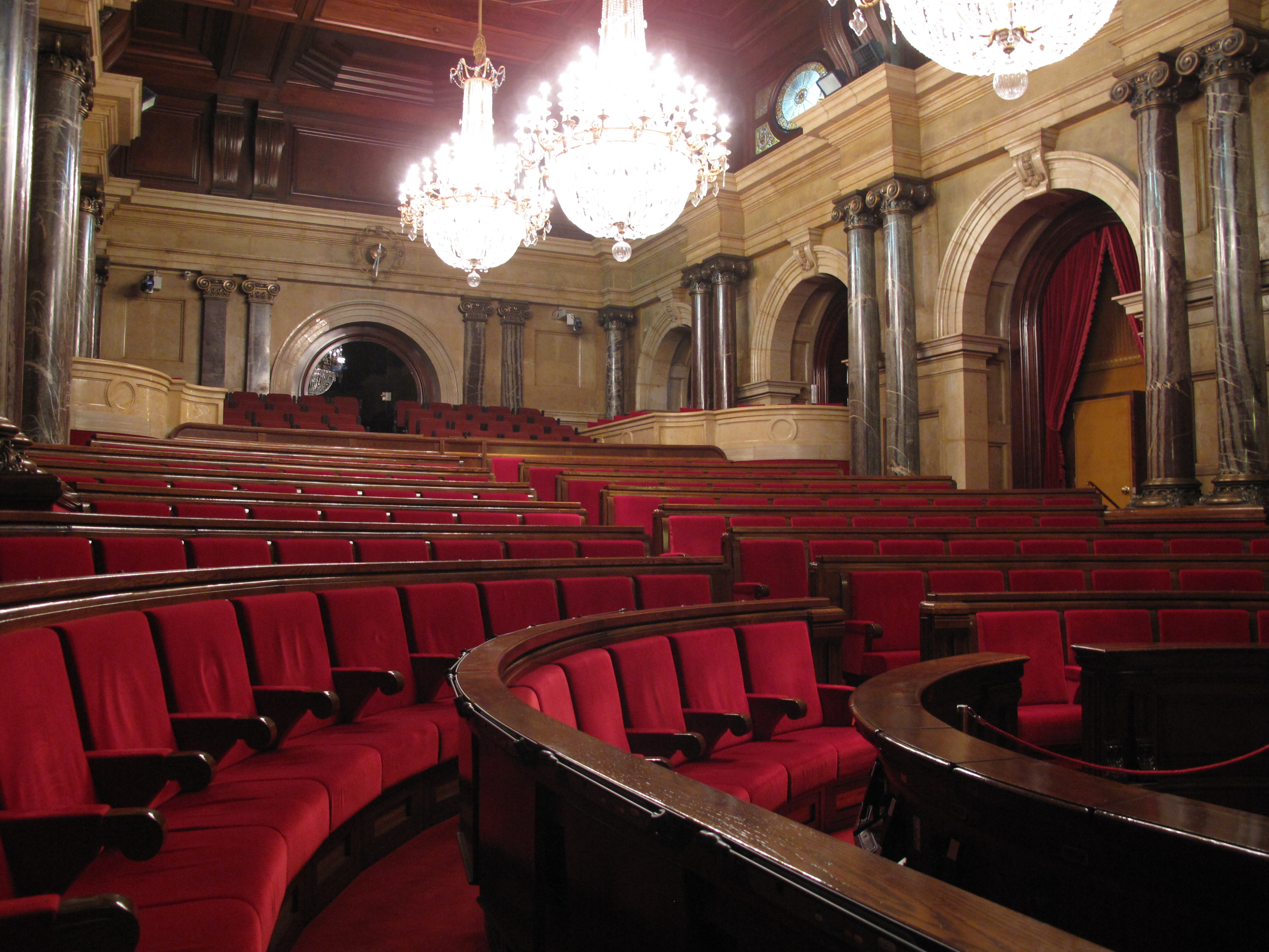 Detall de l'hemicicle del Parlament de Catalunya (Barcelona)